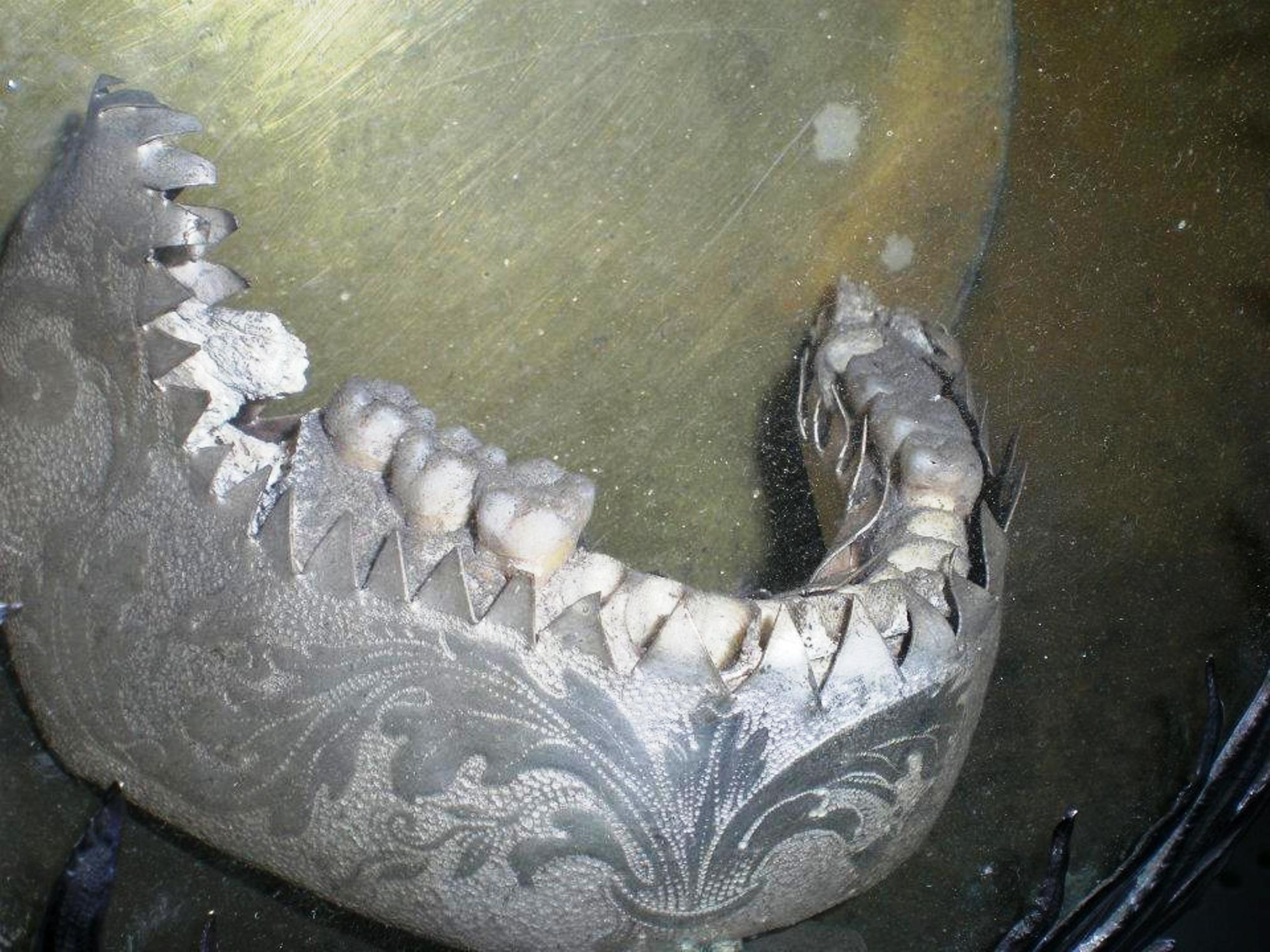 Mandibola di San Cesario diacono e martire, Basilica di San Cesario sul Panaro (Modena)